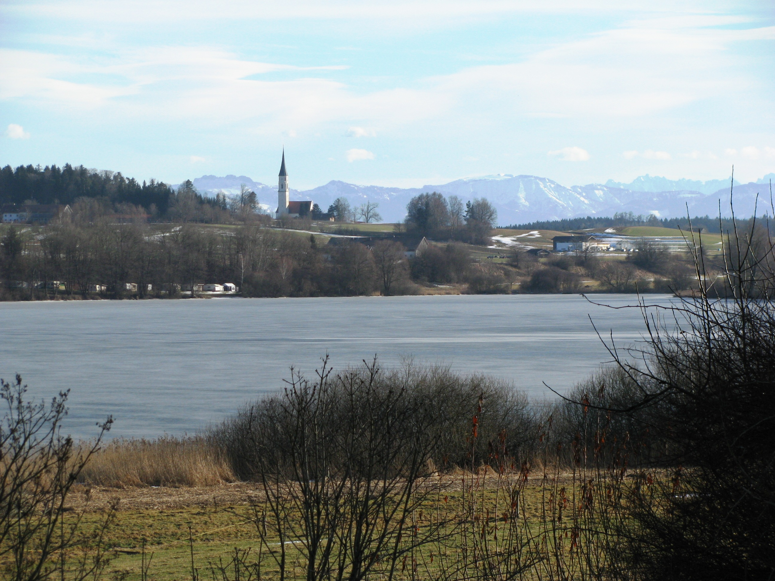 Soyensee mit angetauter Eisdecke im Norden des Landkreises Rosenheim, Blick nach Südsüdost; mit kath. Filialkirche Mariä Himmelfahrt in Kirchreit und Chiemgauer Alpen im Hintergrund